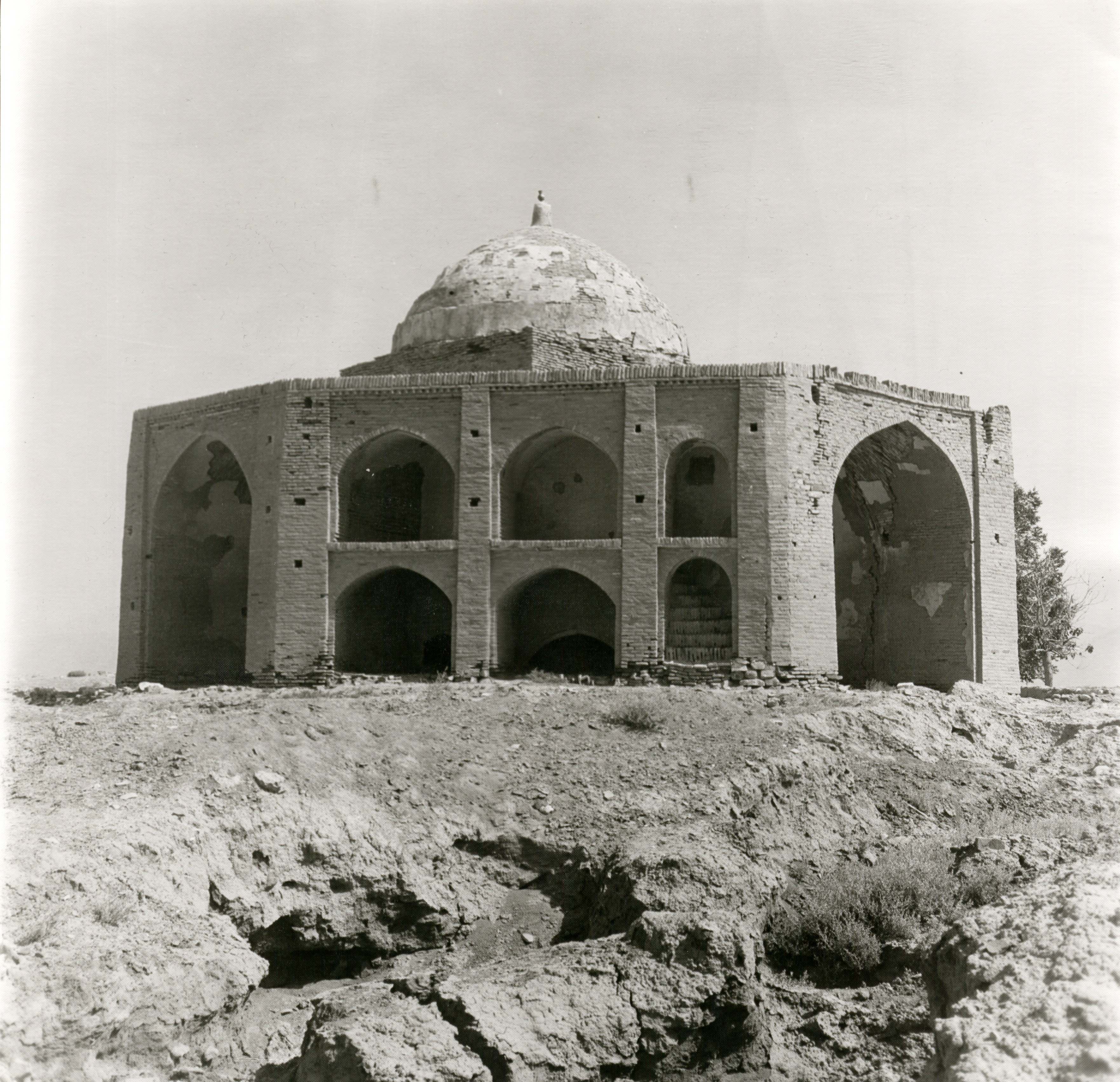 عکس قدیمی از آرامگاه سید حسن غزنوی